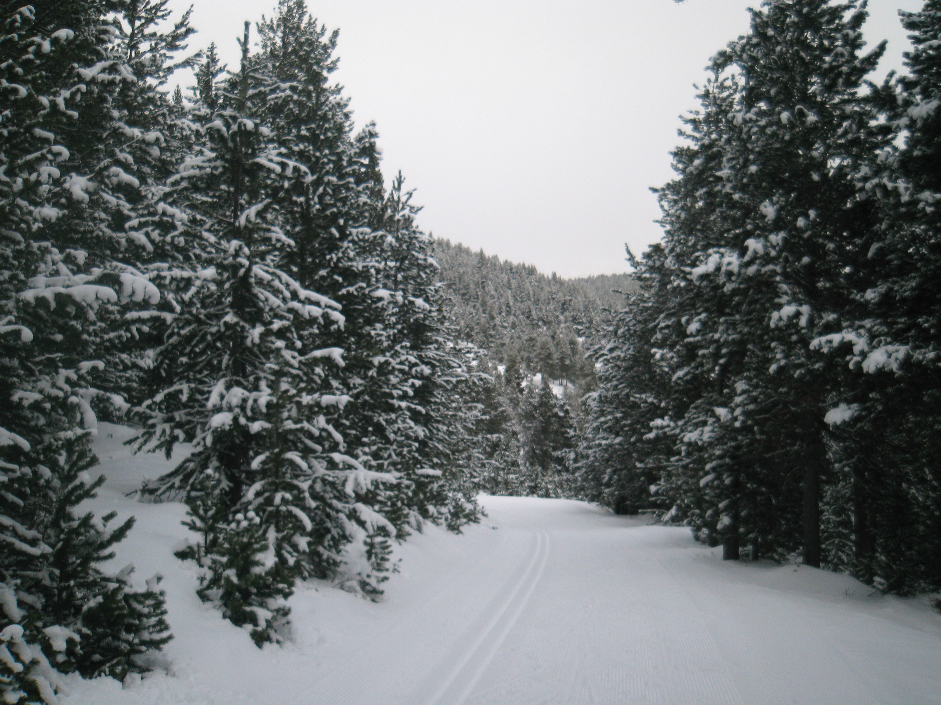 pista d'esquí direcció a mirador, de l'estació d'Aransa.